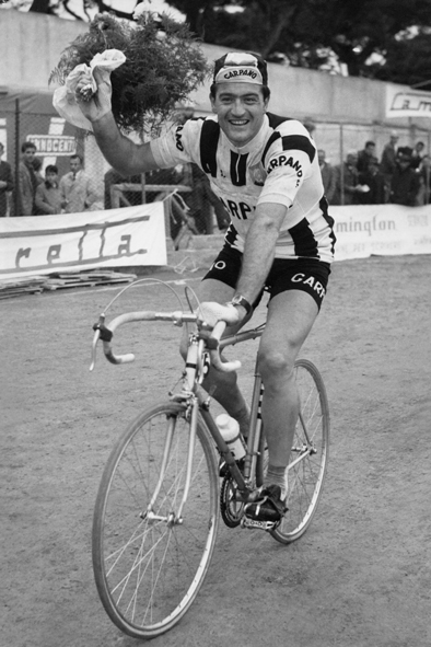 Toni (Vittoria Di Cagliari 1962)